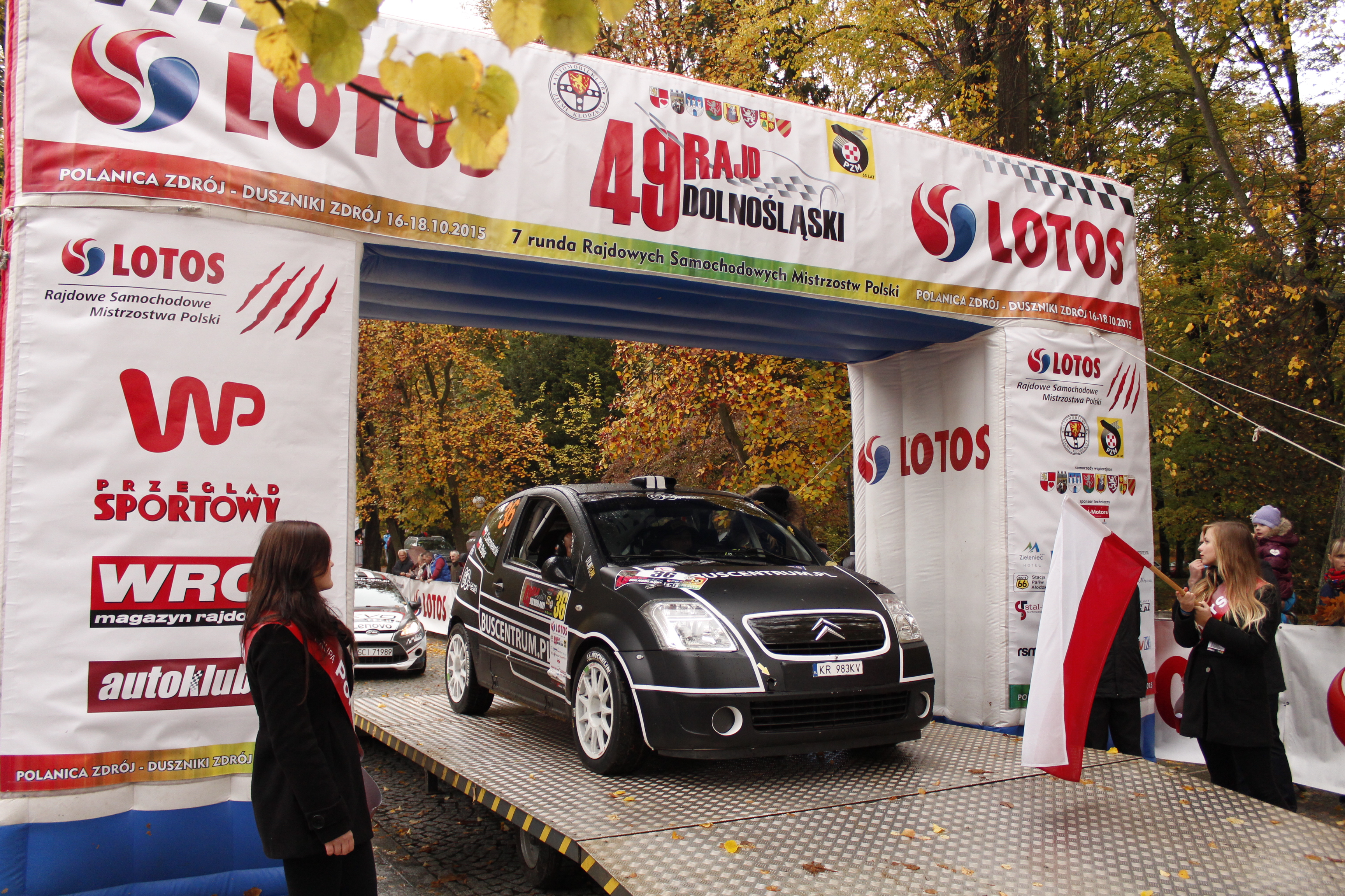 START załogi nr 36 - 49 Rajd Dolnośląski